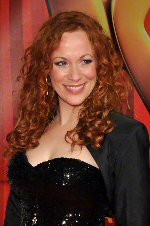 Madlen Kaniuth auf der Kinderlachen-Gala in Dortmund am 7. Dezember 2013.